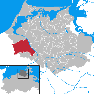 Marlow in Mecklenburg-Vorpommern - District Nordvorpommern